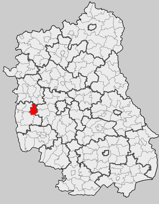 Map of gmina Poniatowa, Opole Lubelskie county, Lublin voivodship Mapa gminy Poniatowa, powiat opolski, województwo lubelskie